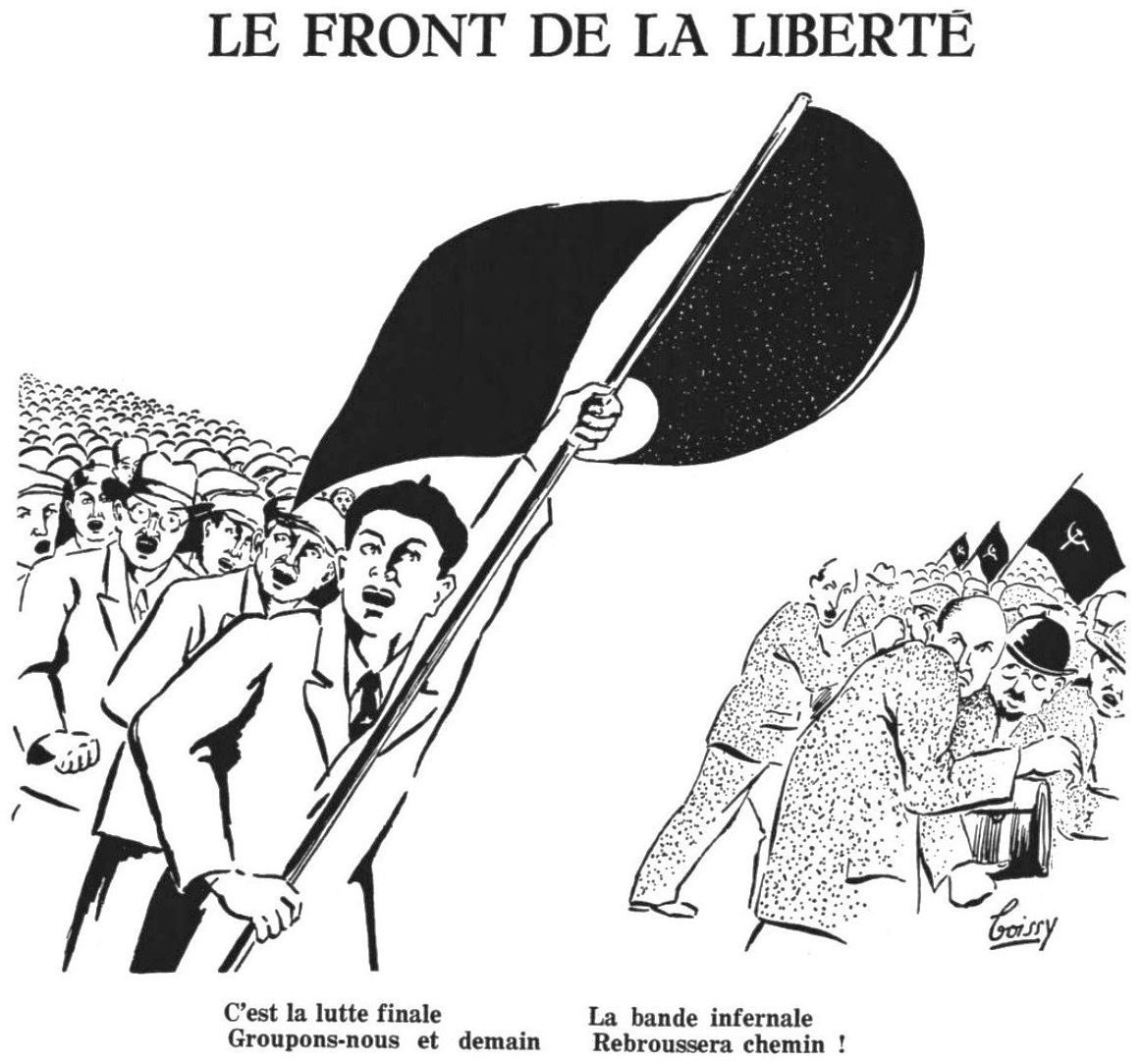 Dessin de propagande anticommuniste en faveur du Front de la liberté.